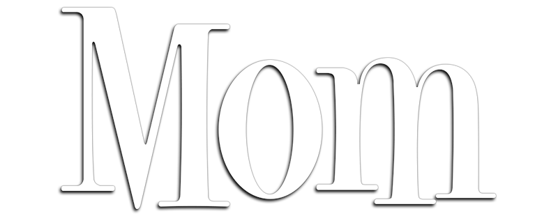 Mom Logo